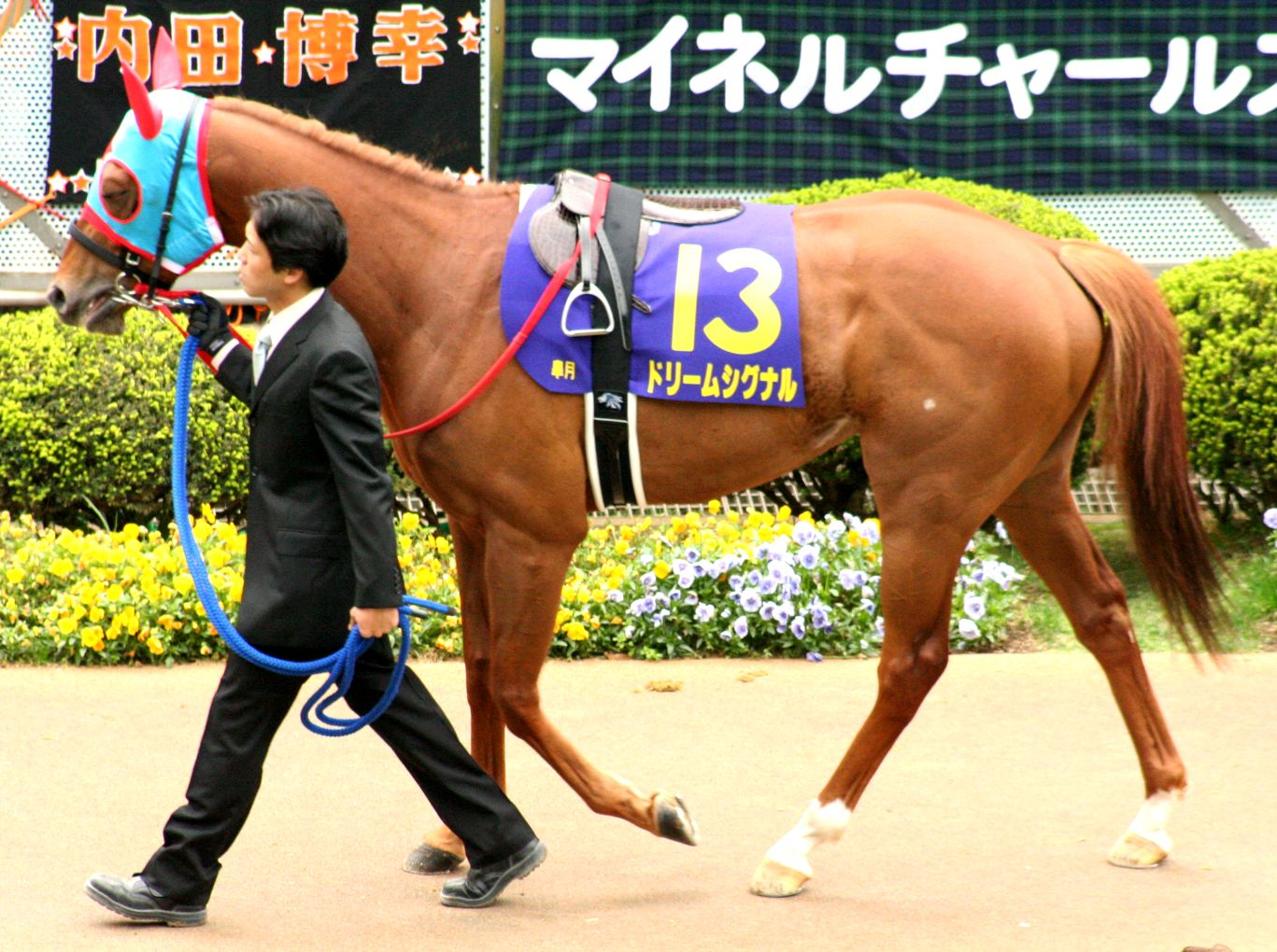 ドリームシグナル（中山競馬場 第68回皐月賞）